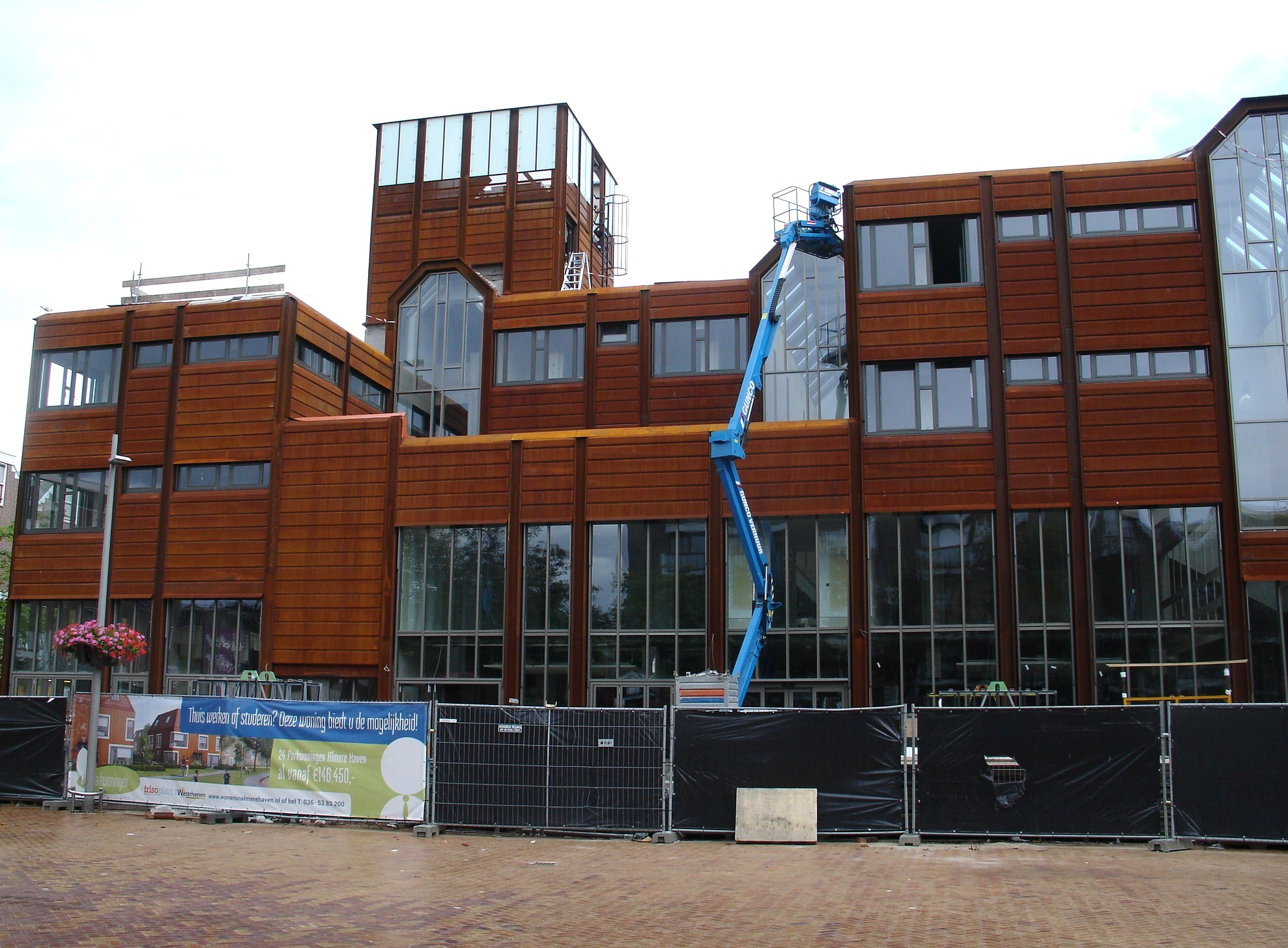 Theater De Roestbak in Almere-Haven tijdens renovatie